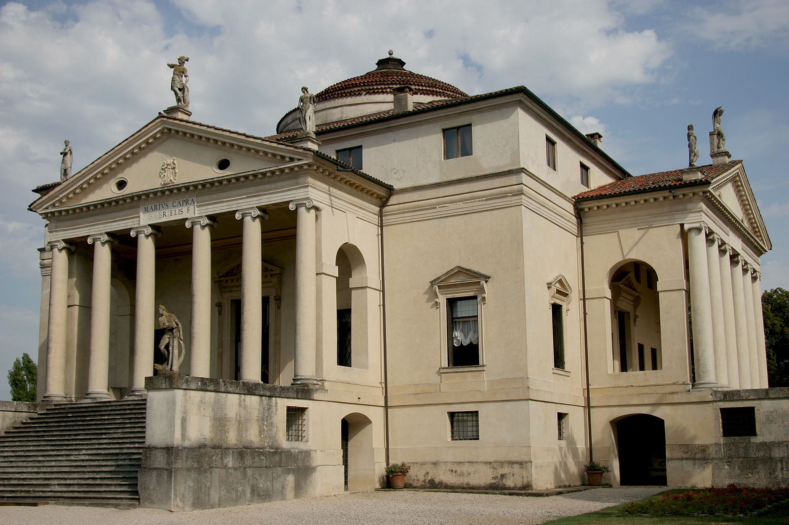 Villa Almerico Capra (La Rotonda), Vicenza, Italia.